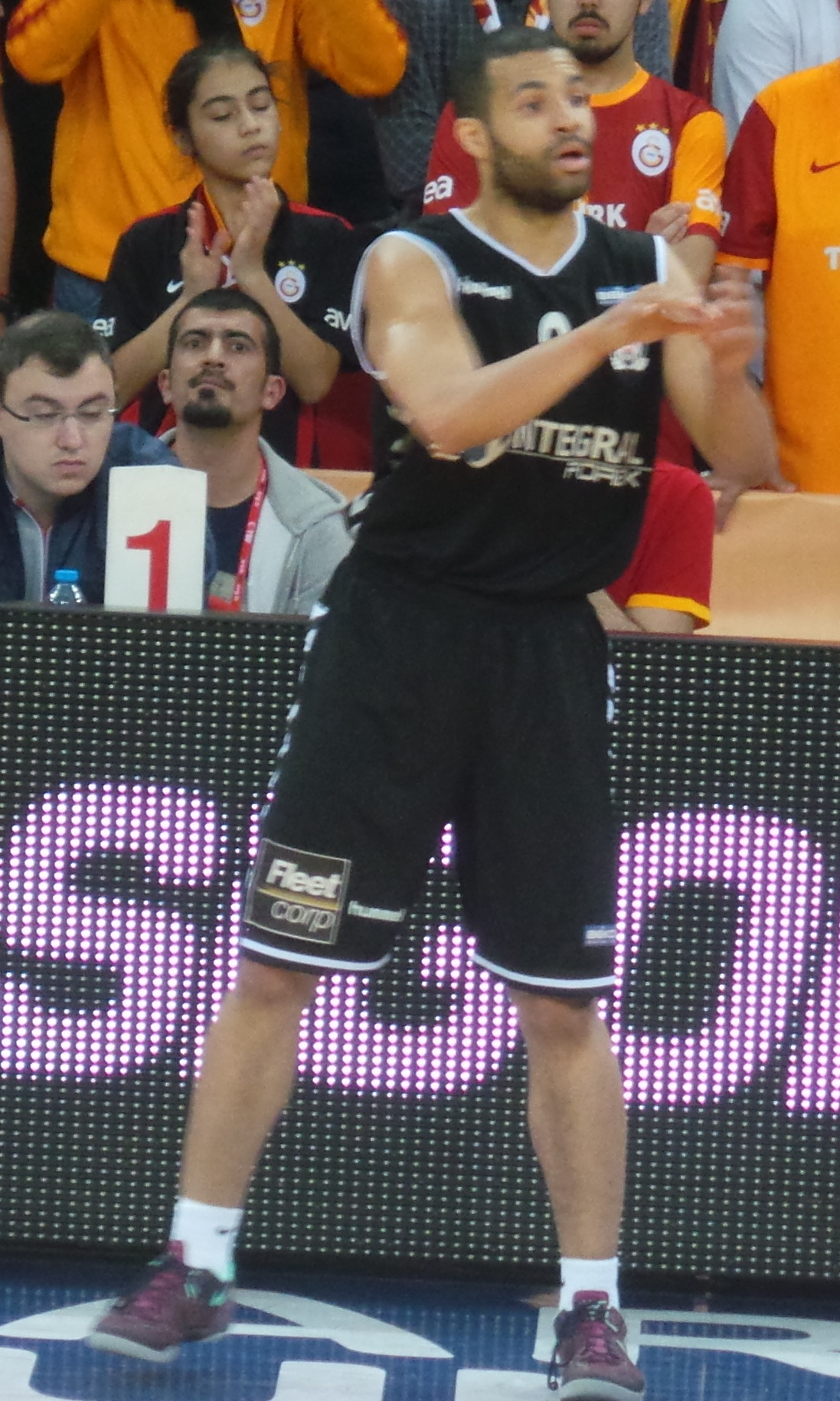 Chris Lofton